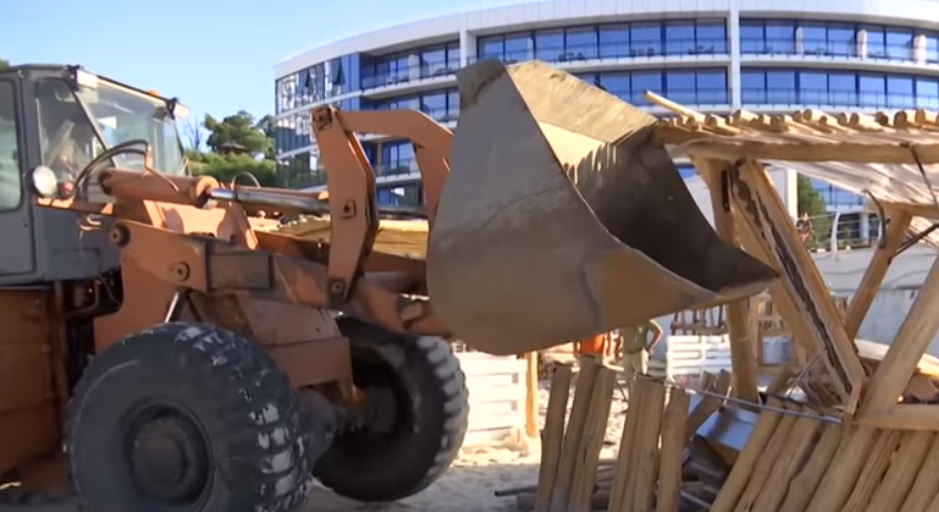 Демонтаж павільйонів на пляжі Одеси комунальною установою "Муніципальна варта" 3 лип. 2018 р.